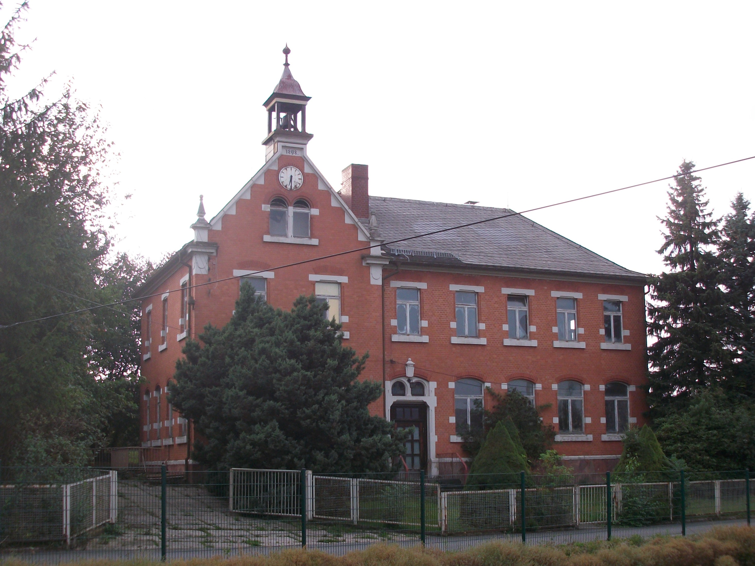 Gablenz (Stollberg), Schulstraße 2 (Ehemalige Schule)